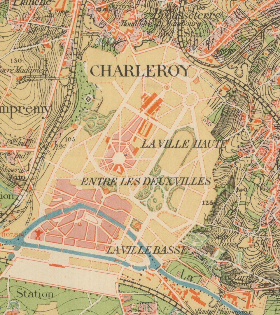 Charleroi - carte imprimée par le Dépôt de la Guerre à Bruxelles en 1873 - levée et nivelée en 1866. L'aménagement de la ville est celui primé en 1867.